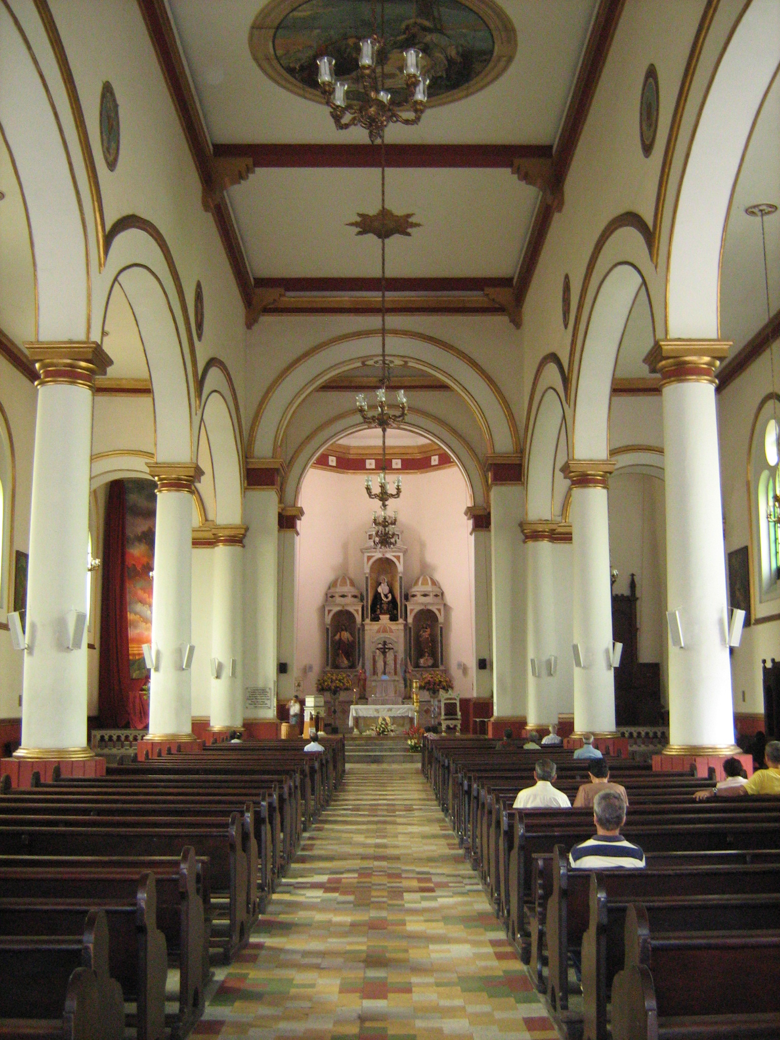 Iglesia de Nuestra Señora de los Dolores, Barrio La América, Medellín, Colombia.